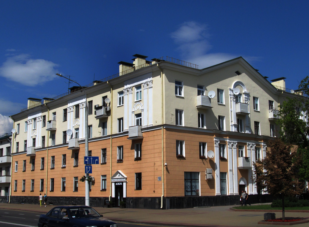 Брэст. Вуліца Леніна, 18